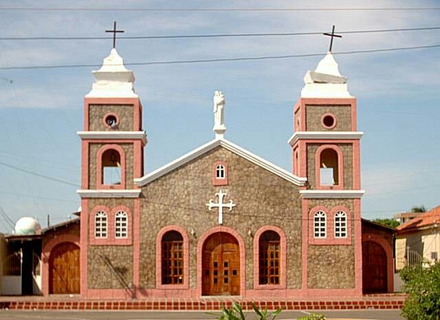 Iglesia de San Jose, Paraguaipoa, Municipio Guajira, Estado Zulia, Venezuela